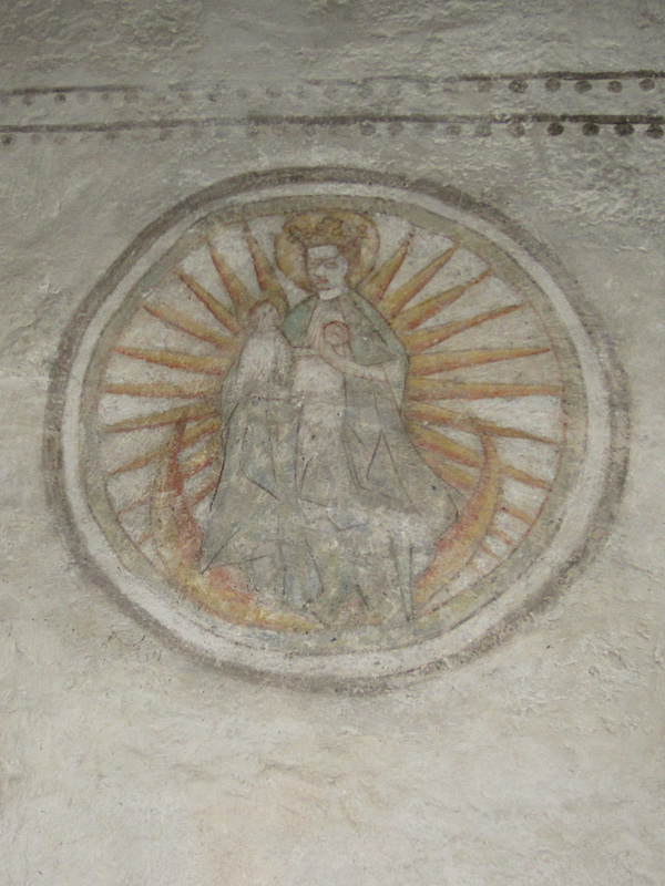 Finströms kyrka Maria in Sole